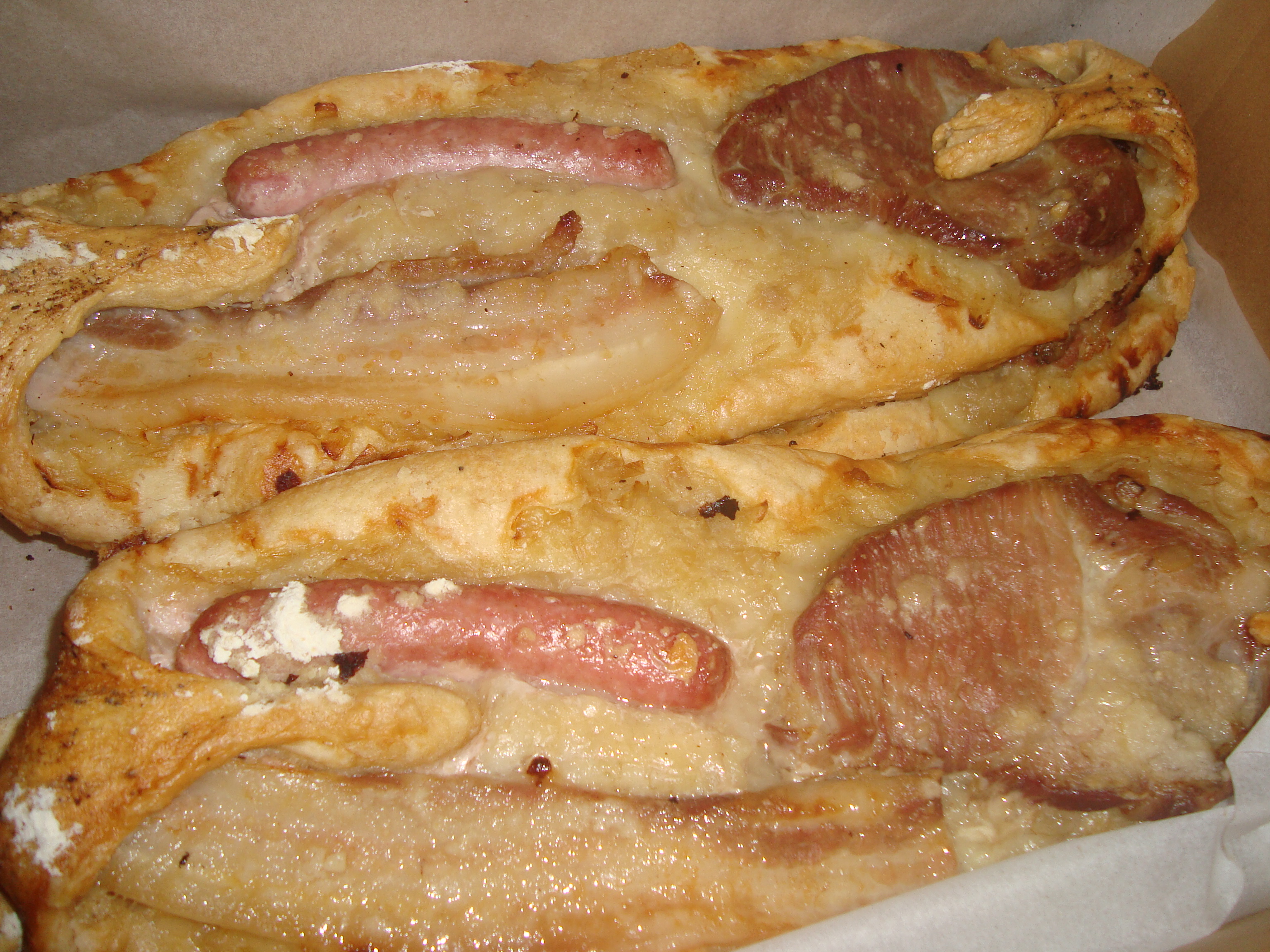 Cocas de pasta de pan con carne magra de cerdo, cebolla frita, longanizas y tocino de panceta fresca. Todo cocido al horno de panadero.